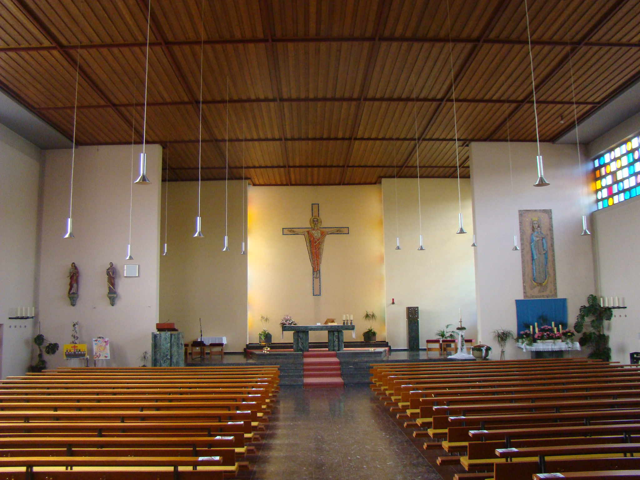 Eppingen-Richen, kath. Kirche Mariä Geburt